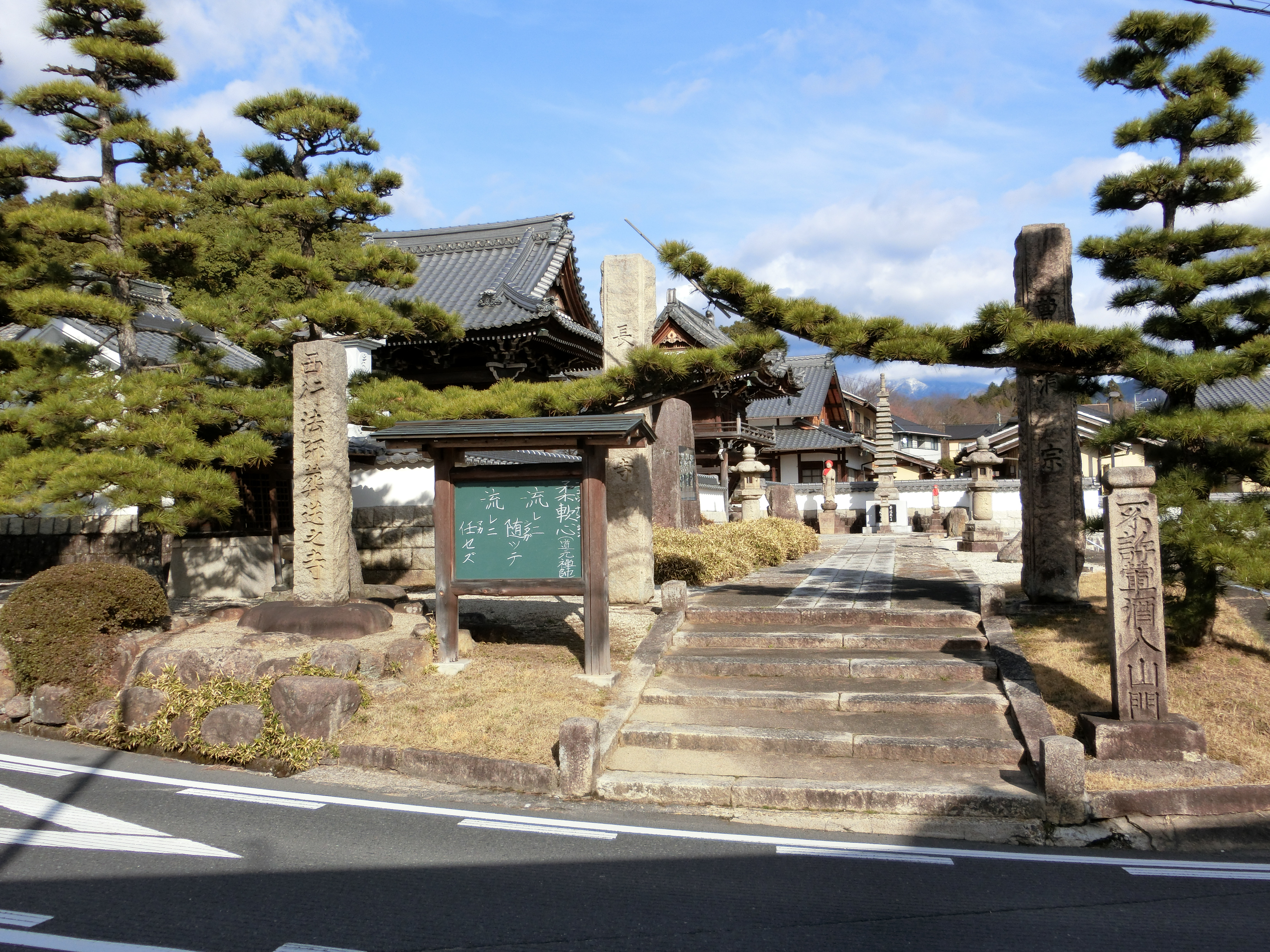 恵那市の曹洞宗寺院、長国寺。恵那三十三観音霊場札所。